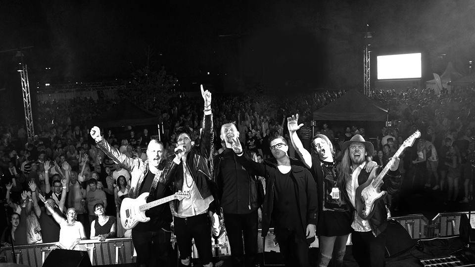 Art Nation live@Latitud 57, Oskarshamn